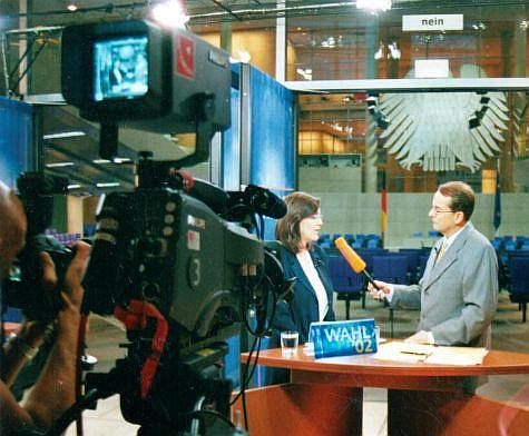 Kerstin Müller (links) am 22. September 2002, dem Tag der Bundestagswahl, abends vor dem Plenarsaal des Bundestages im Interview mit dem Fernsehsender phoenix.